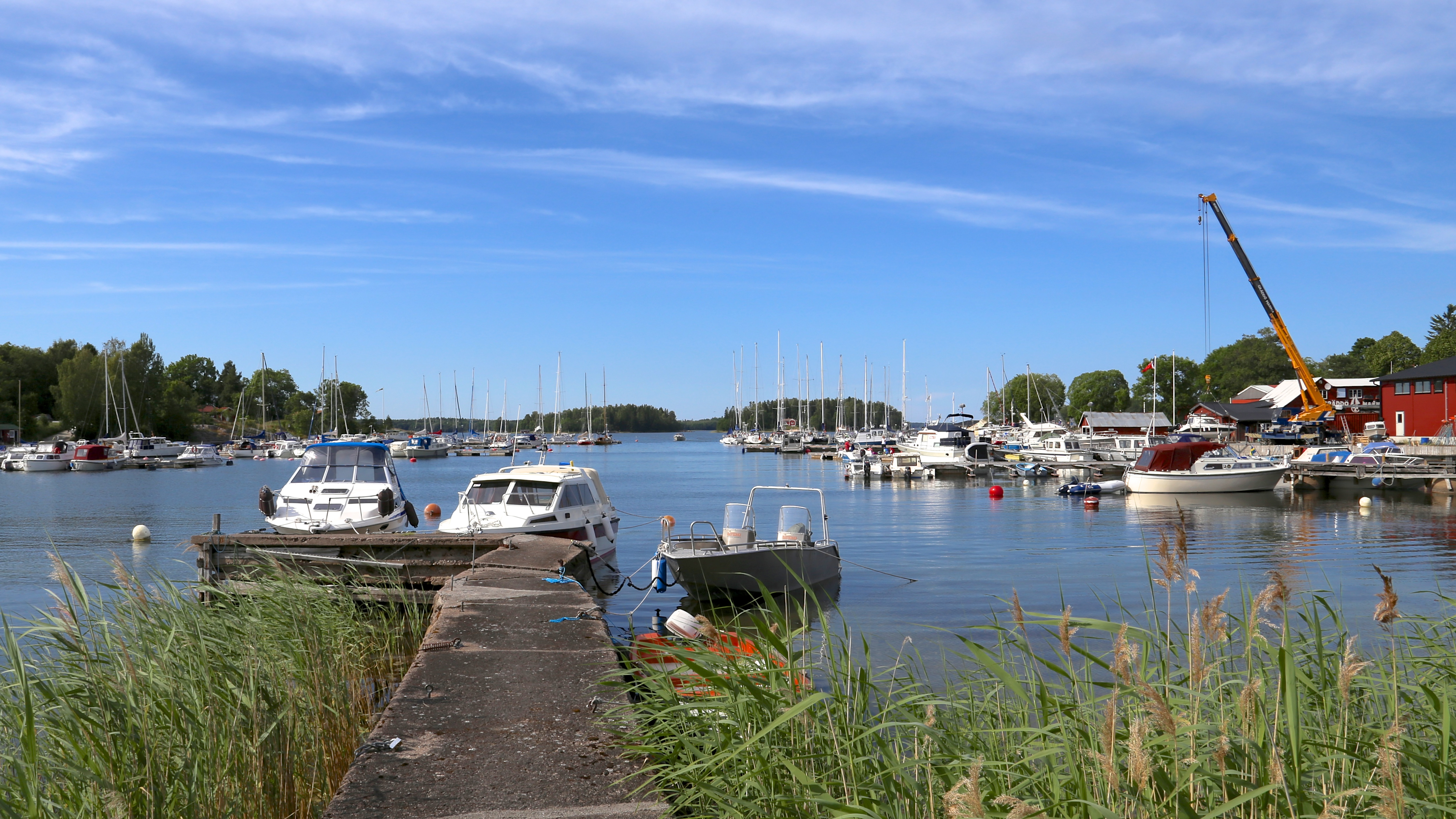 Gräddö